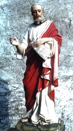 Foto della statua di San Matteo situata nell'eremo del Monte Caio (Parma).